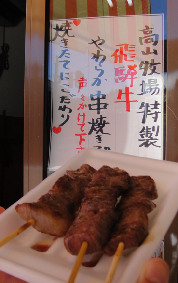 高山で売られている飛騨牛（黒毛和牛）の串焼き